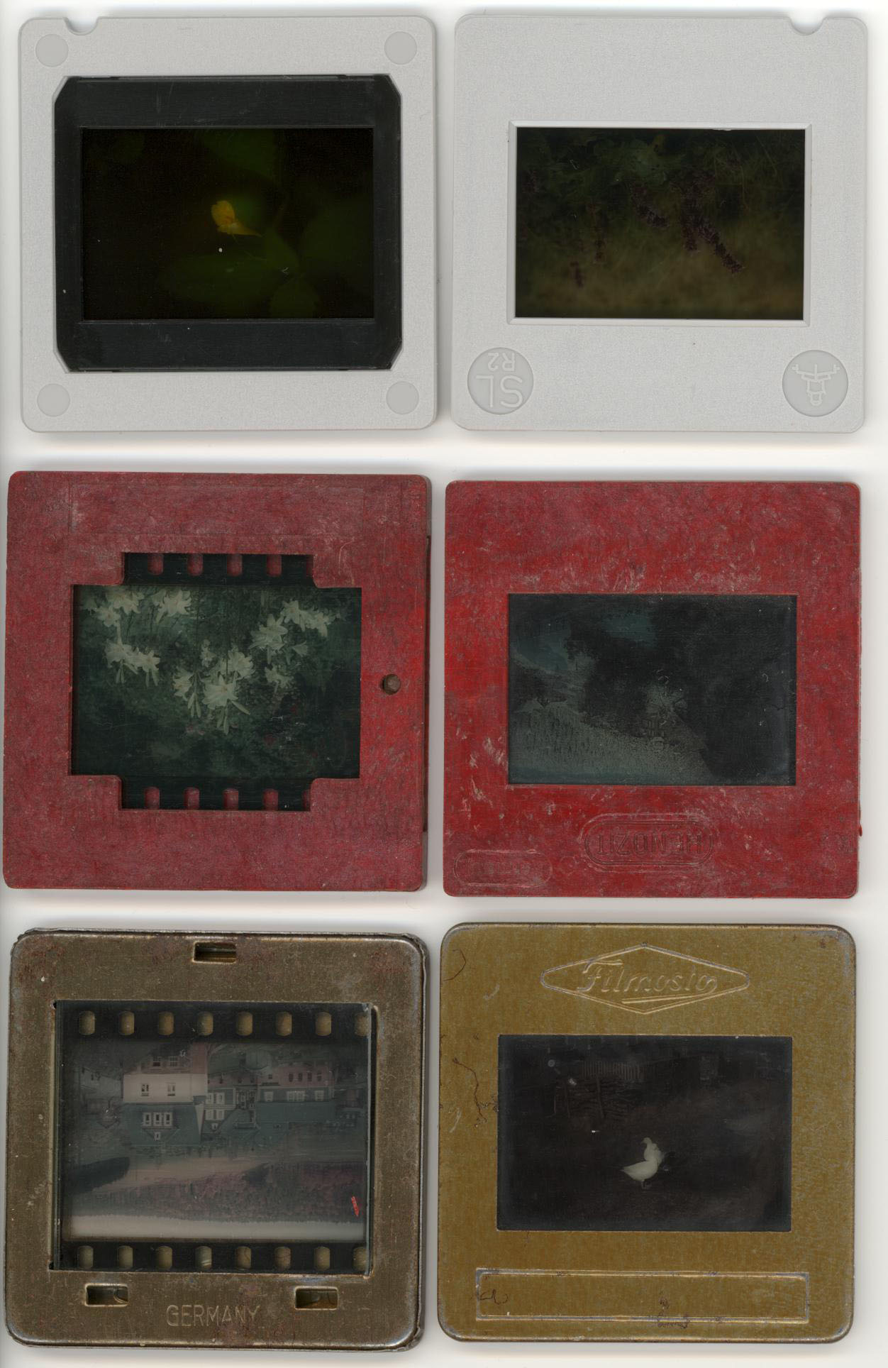 Diapositive Dias in verschiedenen Rahmen: glasloser Kunststoffrahmen (ca. 1985), Kunststoffrahmen mit Glas (1940er Jahre), Metallrahmen mit Glas (1940er Jahre) Verschiedene Bauformen ca. 1942 und ca. 1985 english: old slides from Werner Eschrich, new slides from Bernd Hutschenreuther